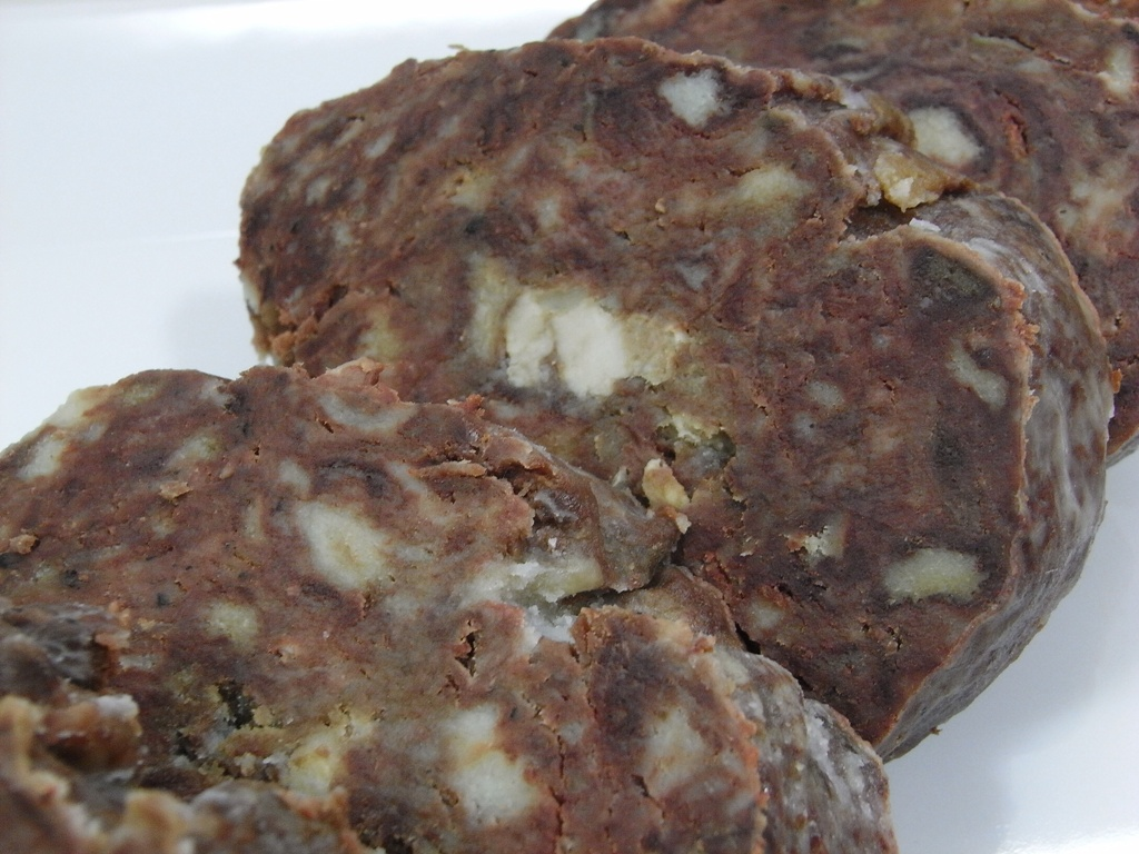 Boronos de Asturias